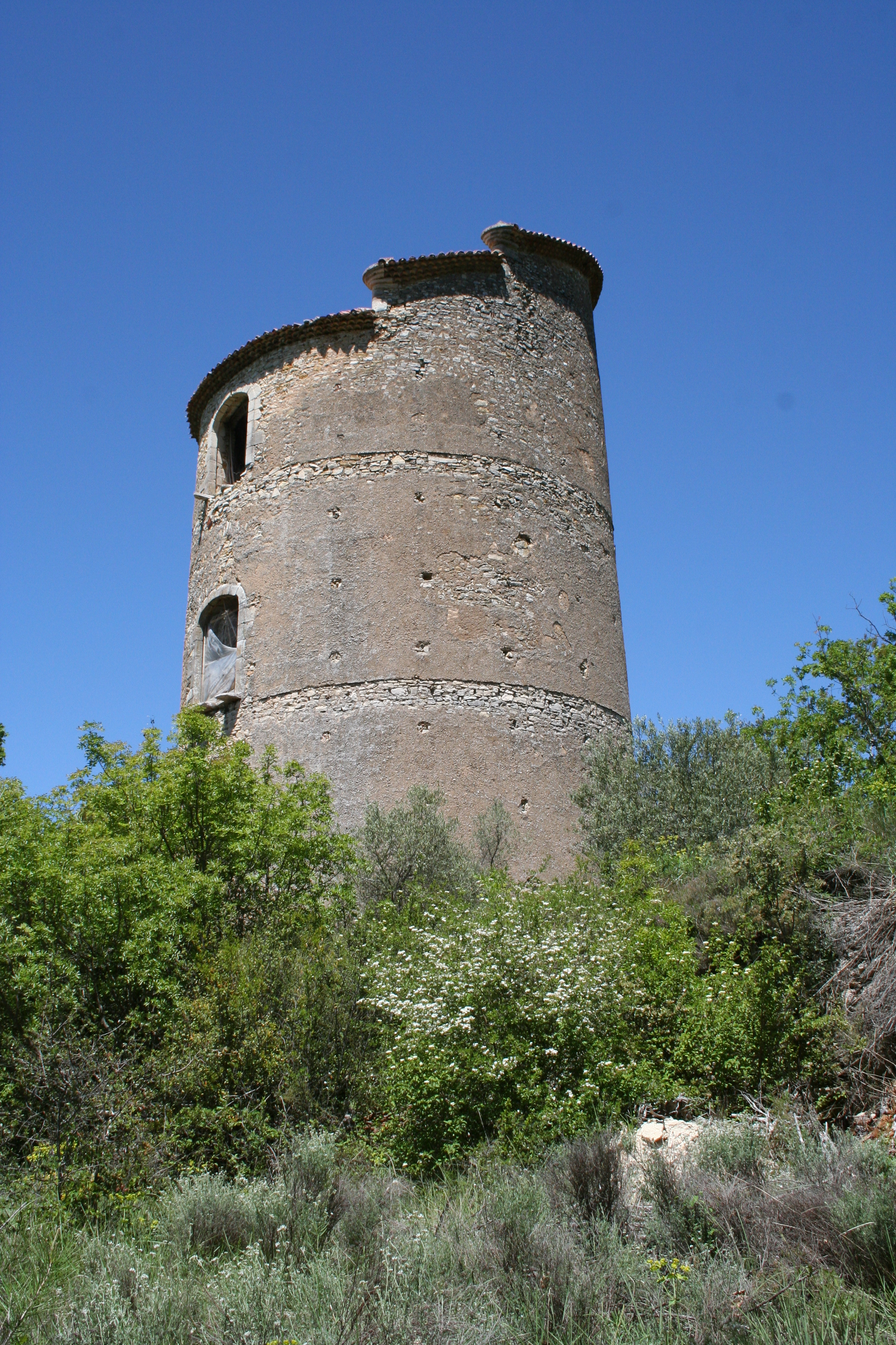 Pigeonnier de Brue-Auriac (Var) du XVIII° siècle. C'est le plus grand des pigeonniers en France de cette époque : sa hauteur est de 22.5 mètres et son diamètre dépasse 12 mètres.